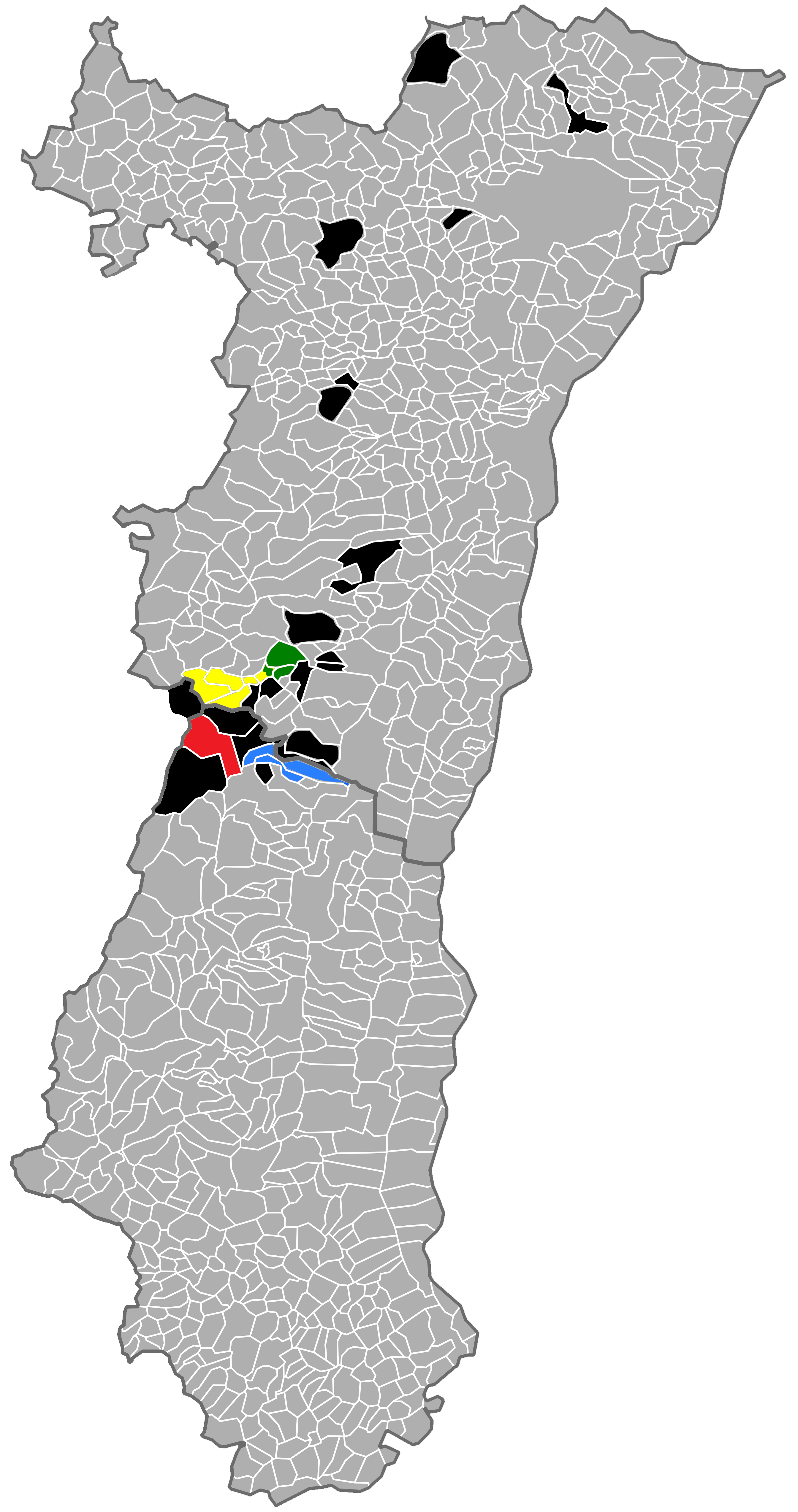 Carte des concessions et gisements houillers du Bassin houiller de la Vallée de Villé.